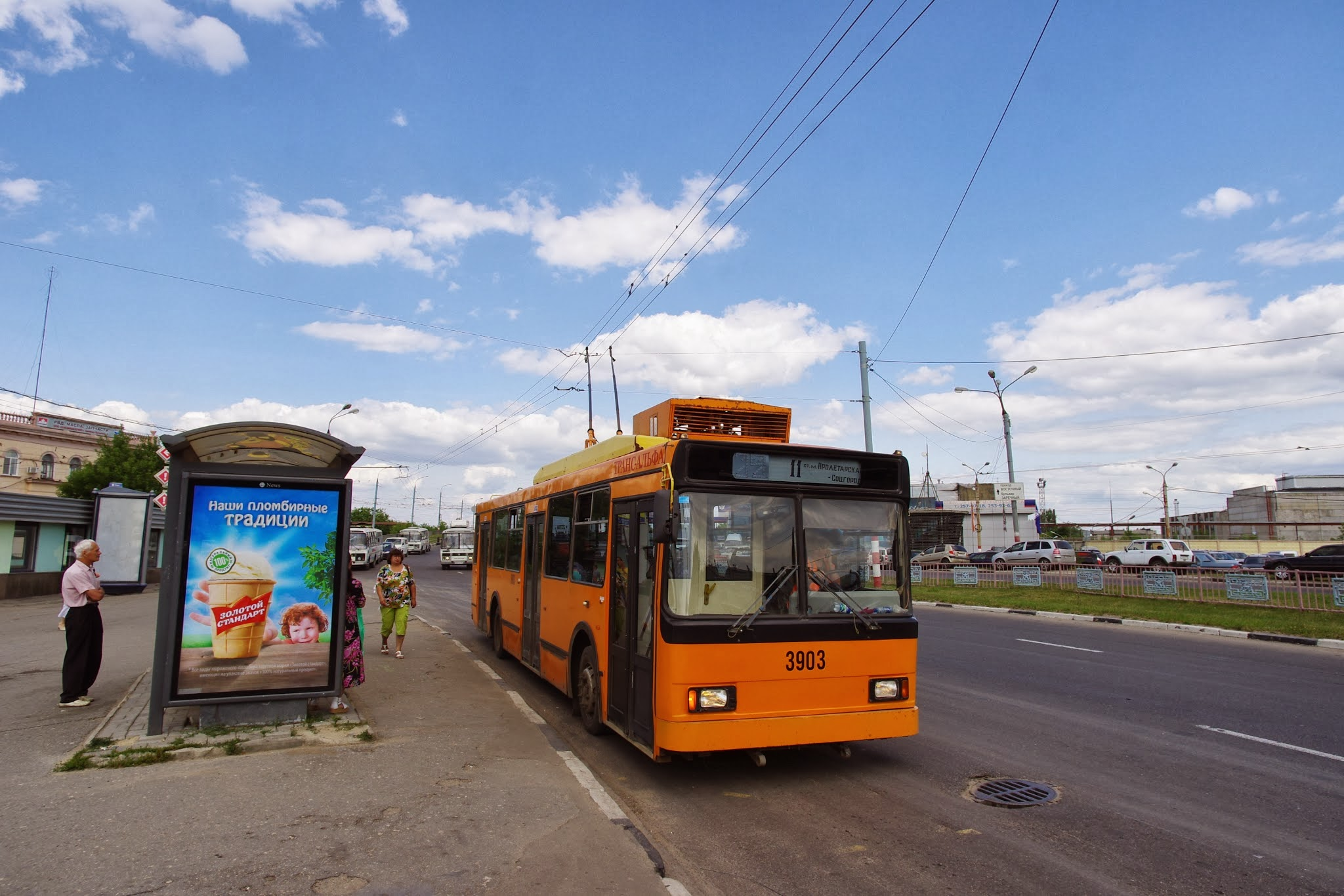 Avtozavodsky City District, Nizhny Novgorod, Nizhny Novgorod Oblast, Russia